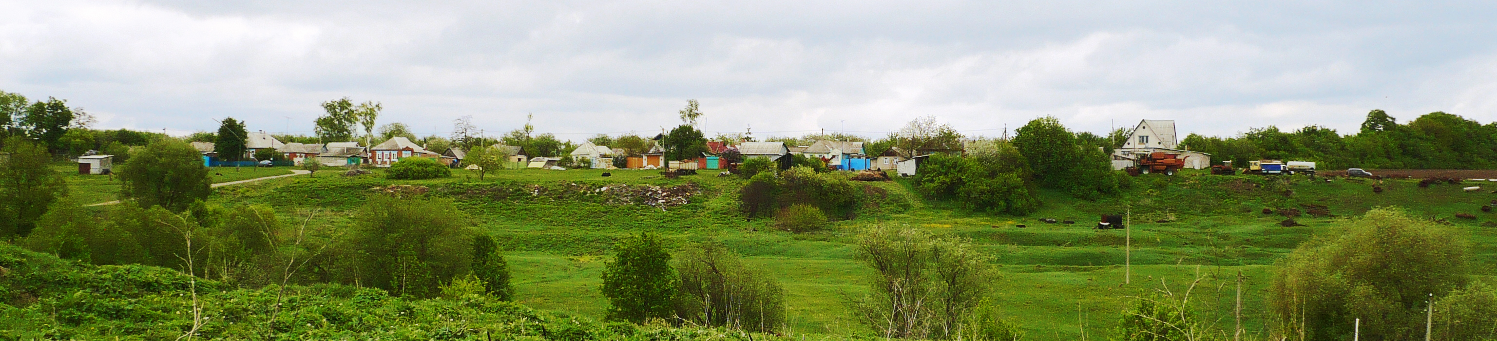 Хутор Гремячий. Шебекинский район Белгородской области.